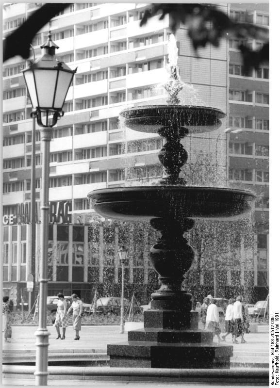 ADN-ZB-Kaufhold-12.5.81-Berlin: Der Spindler-Brunnen und die ihn umgebenden Altberliner Laternen bilden einen reizvollen Kontrast zu den nahen Hochhäusern der Leipziger Straße.Der Brunnen wurde, nachdem er lange Zeit ein Schattendasein im Stadtbezirk Köpenick geführt hatte, ins Stadtzentrum zurückverpflanzt und bildet heute eine besondere Zierde des Spittelmarktes.